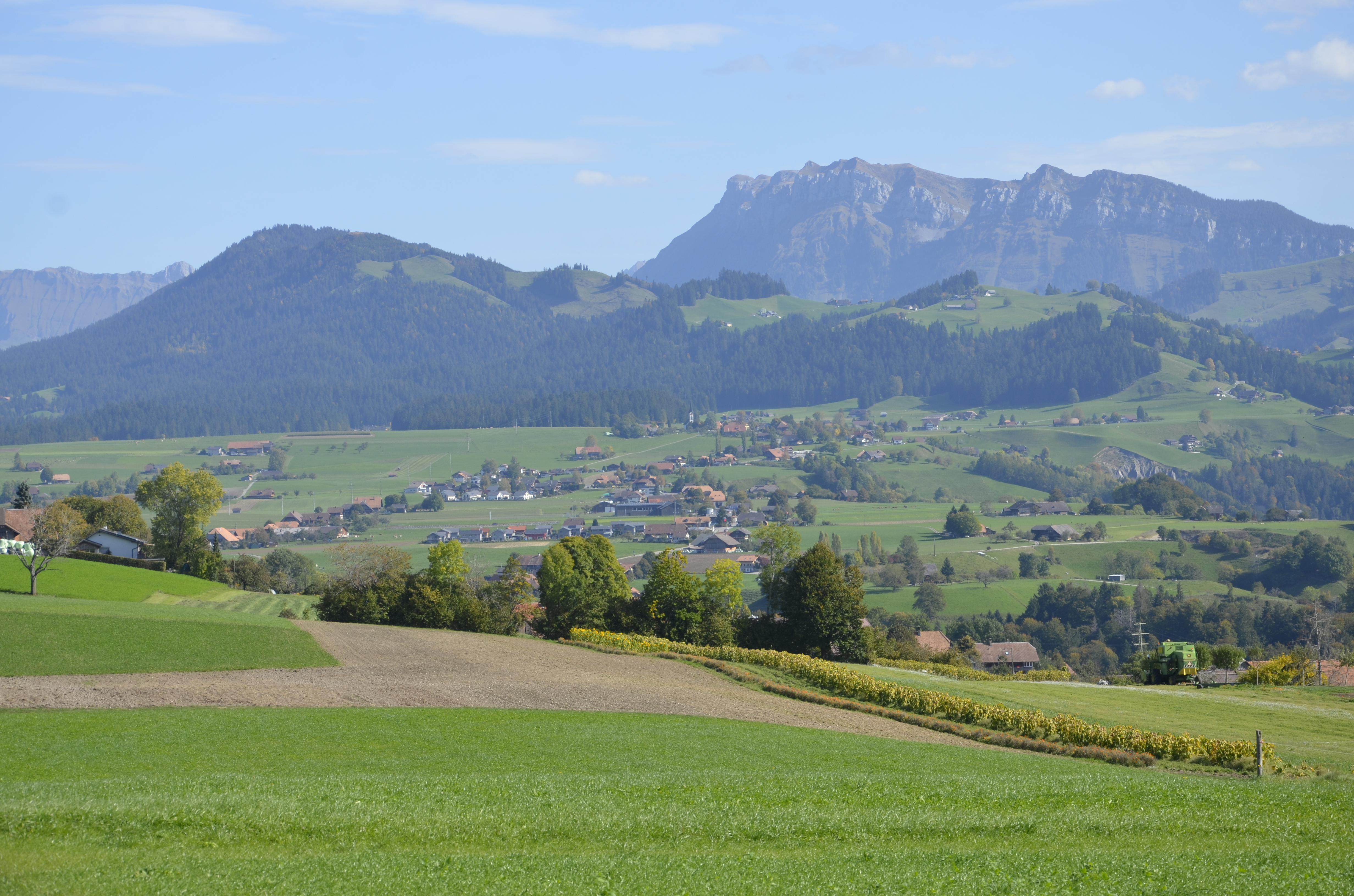 Kanton Bern (Schweiz): im Hintergrund der Hohgant, davor die Honegg (bewaldeter Hügelzug) und das Dorf Schwarzenegg